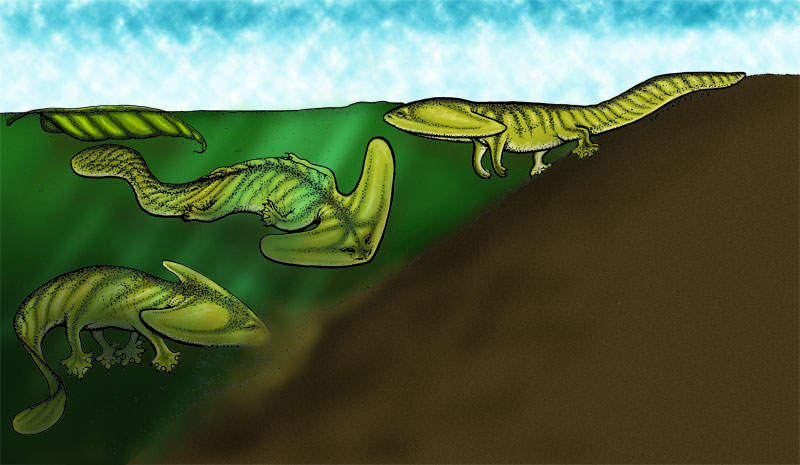 Diploceraspis